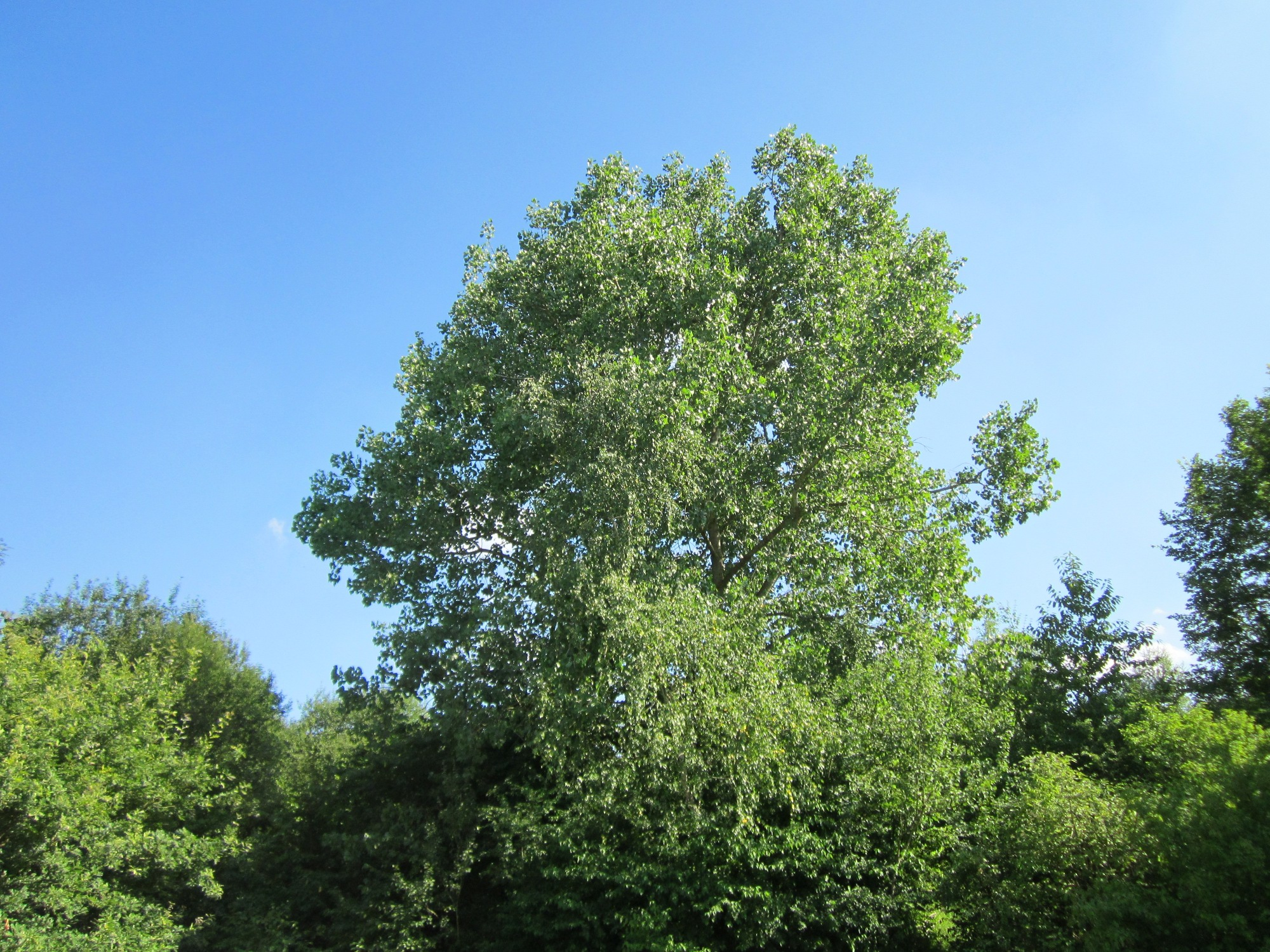 Zitterpappel (Populus tremula) im Naturschutzgebiet "St. Arnualer Wiesen"